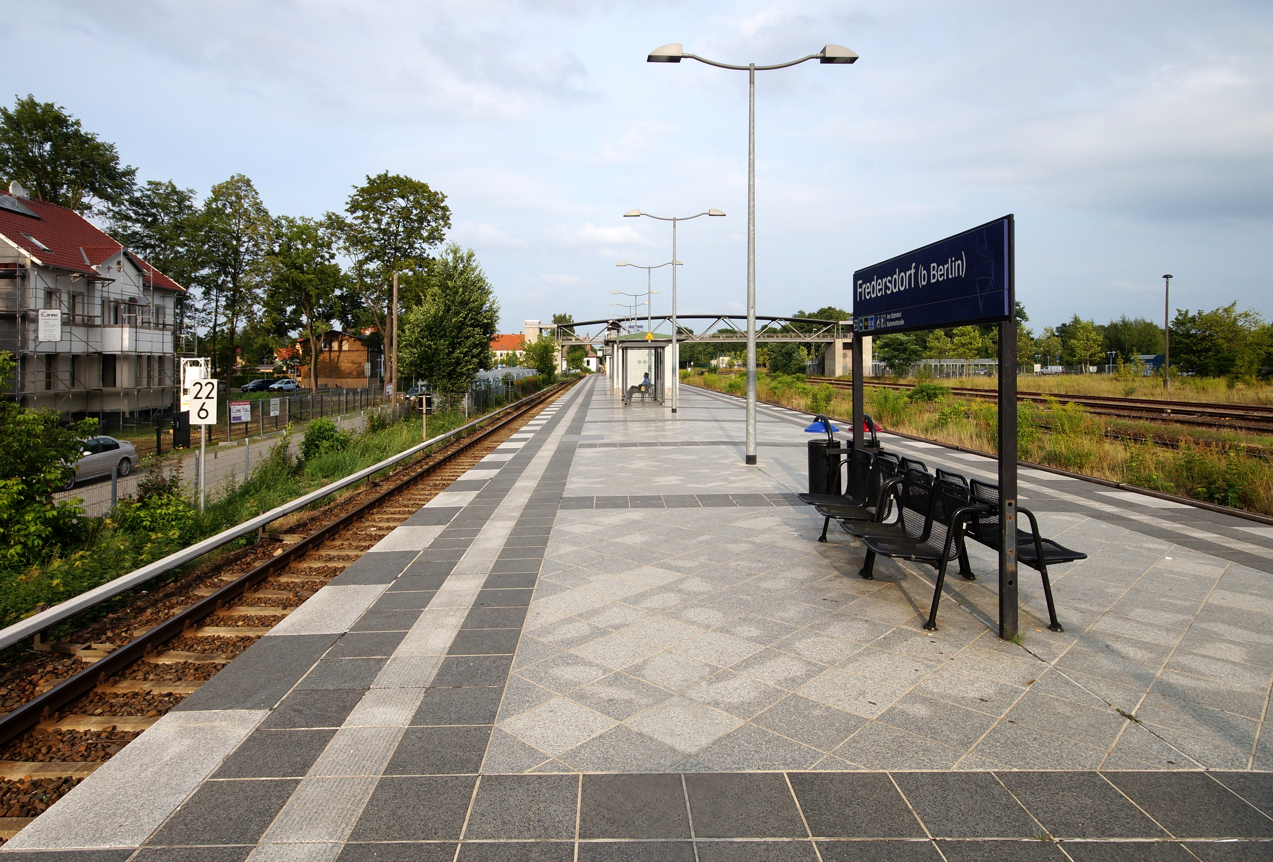 Die Bahnsteige des Bahnhofs Fredersdorf (b Berlin) in Fredersdorf-Vogelsdorf auf der Preußischen Ostbahn